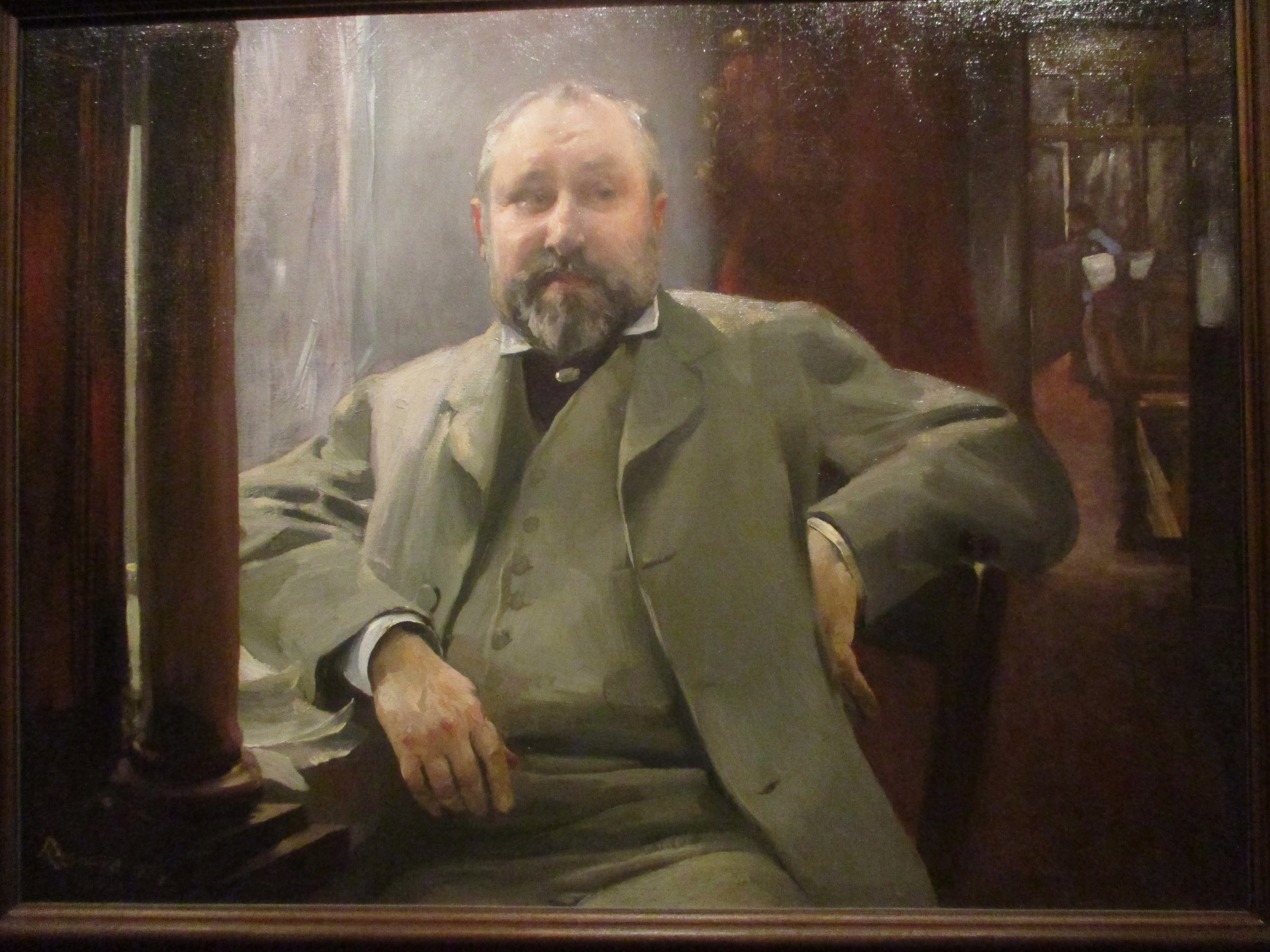 Albert Besnard, Portrait de Francis Magnard (1837-1894), collection du Petit Palais (Paris), don de Mme Francis Magnard, née Olympe Broye, en 1907 (sa seconde épouse). Francis Magnard fut journaliste au Gaulois, puis rédacteur en chef du Figaro dont il était actionnaire. Il est le père du compositeur Albéric Magnard (1865-1914).